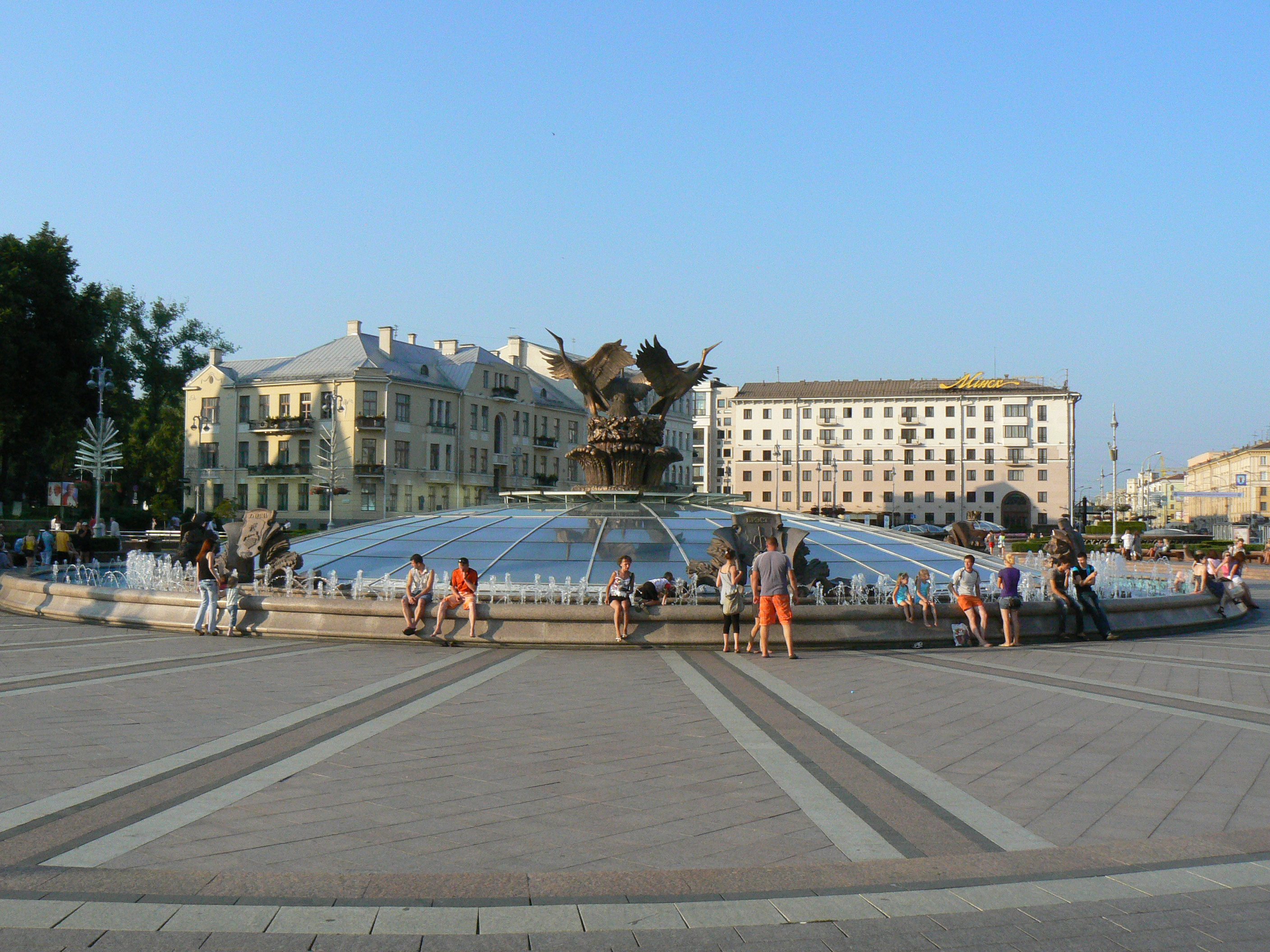 Минск. Площадь Независимости